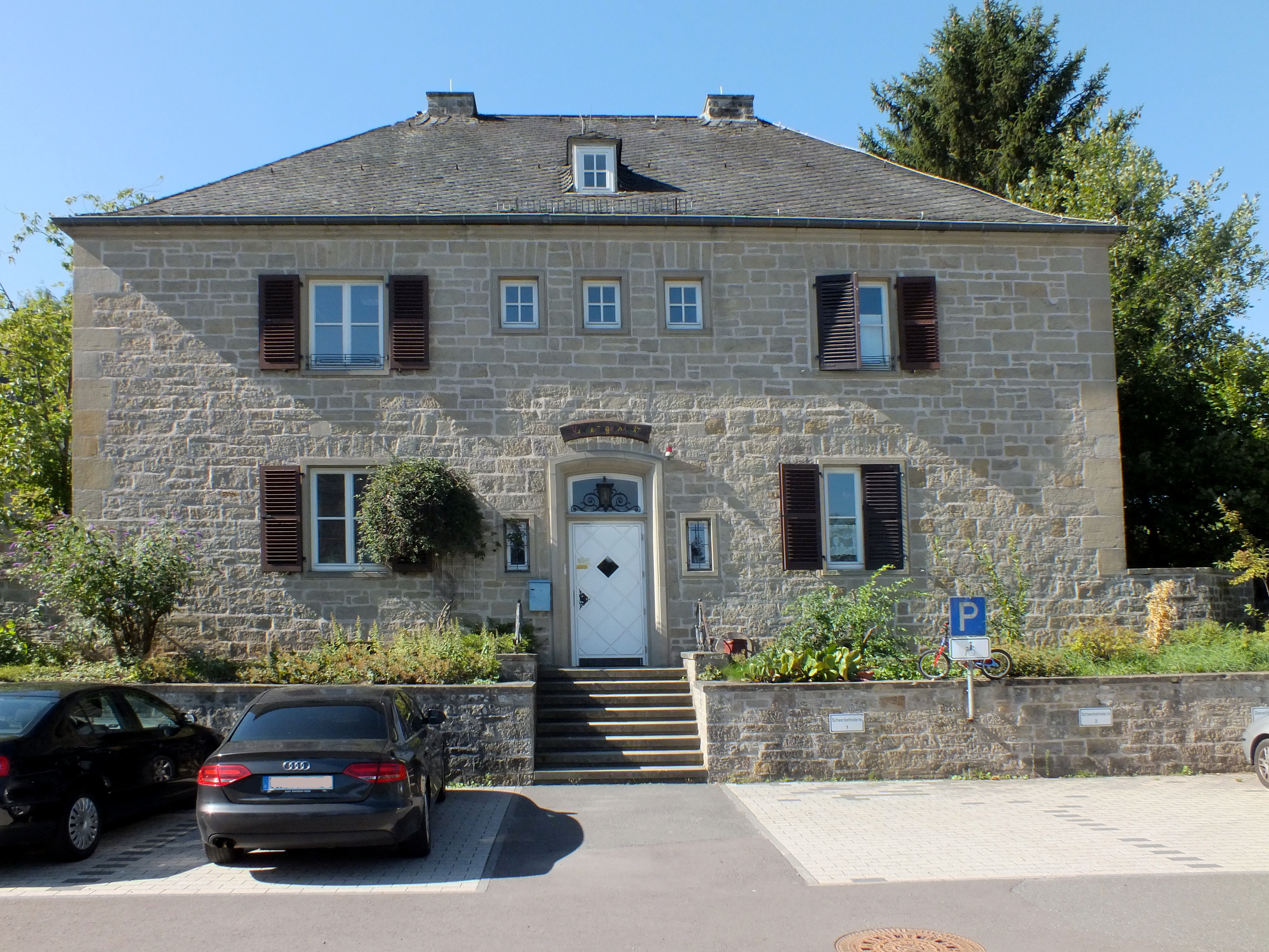 Hochschule Trier, Hauptcampus (Standort Schneidershof) - Kindergarten (ehem. Direktorenvilla) von der Straßenseite